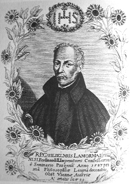 Wilhelm Lamormaini, Jesuit, Professor und Beichtvater Ferdinand II.